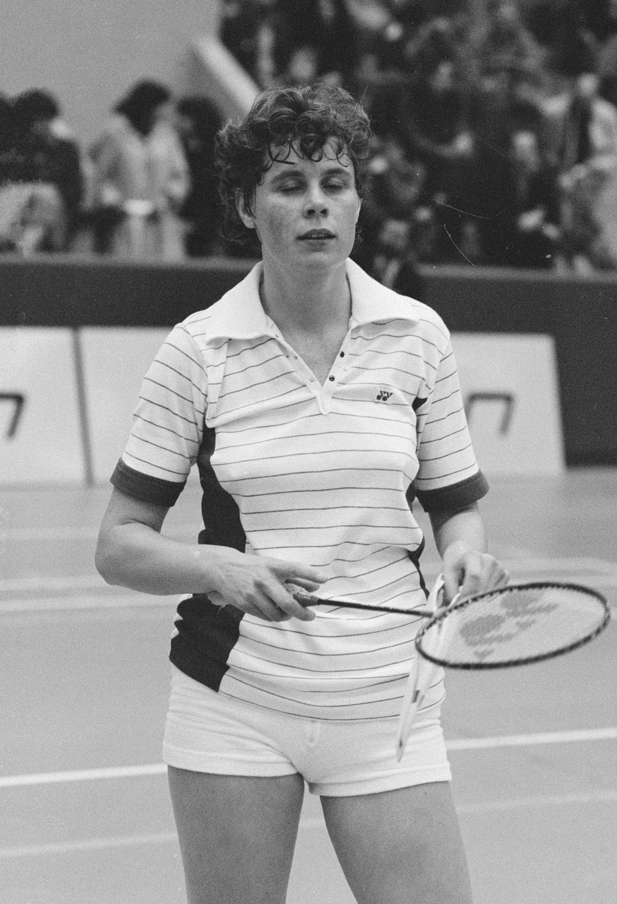 Nationale Kampioenschappen Badminton te Utrecht; Joke van Beusekom